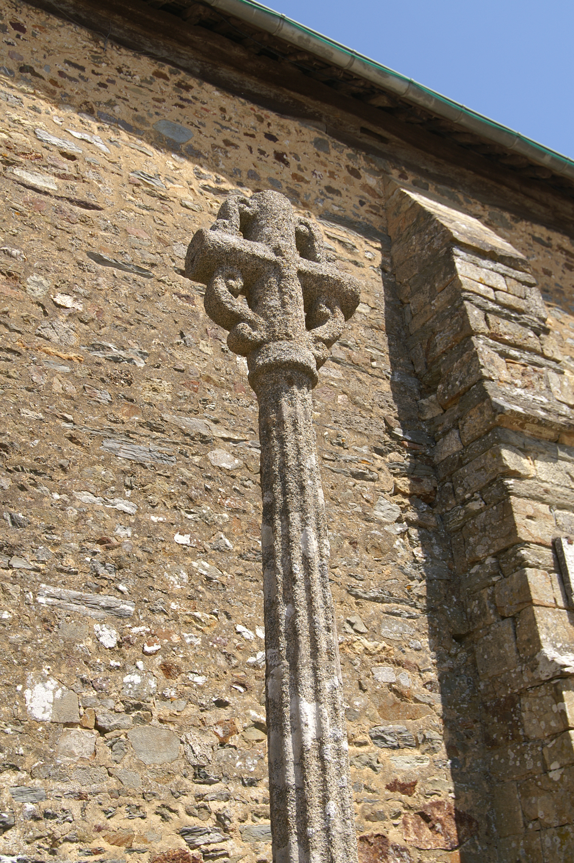 Croix de cimetière à Nouvoitou.